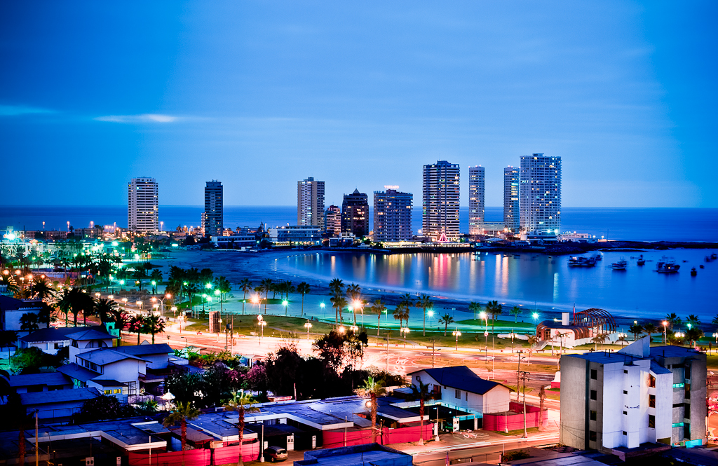 Iquique, do you like It?